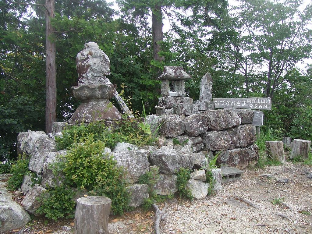 雪光山の頂上